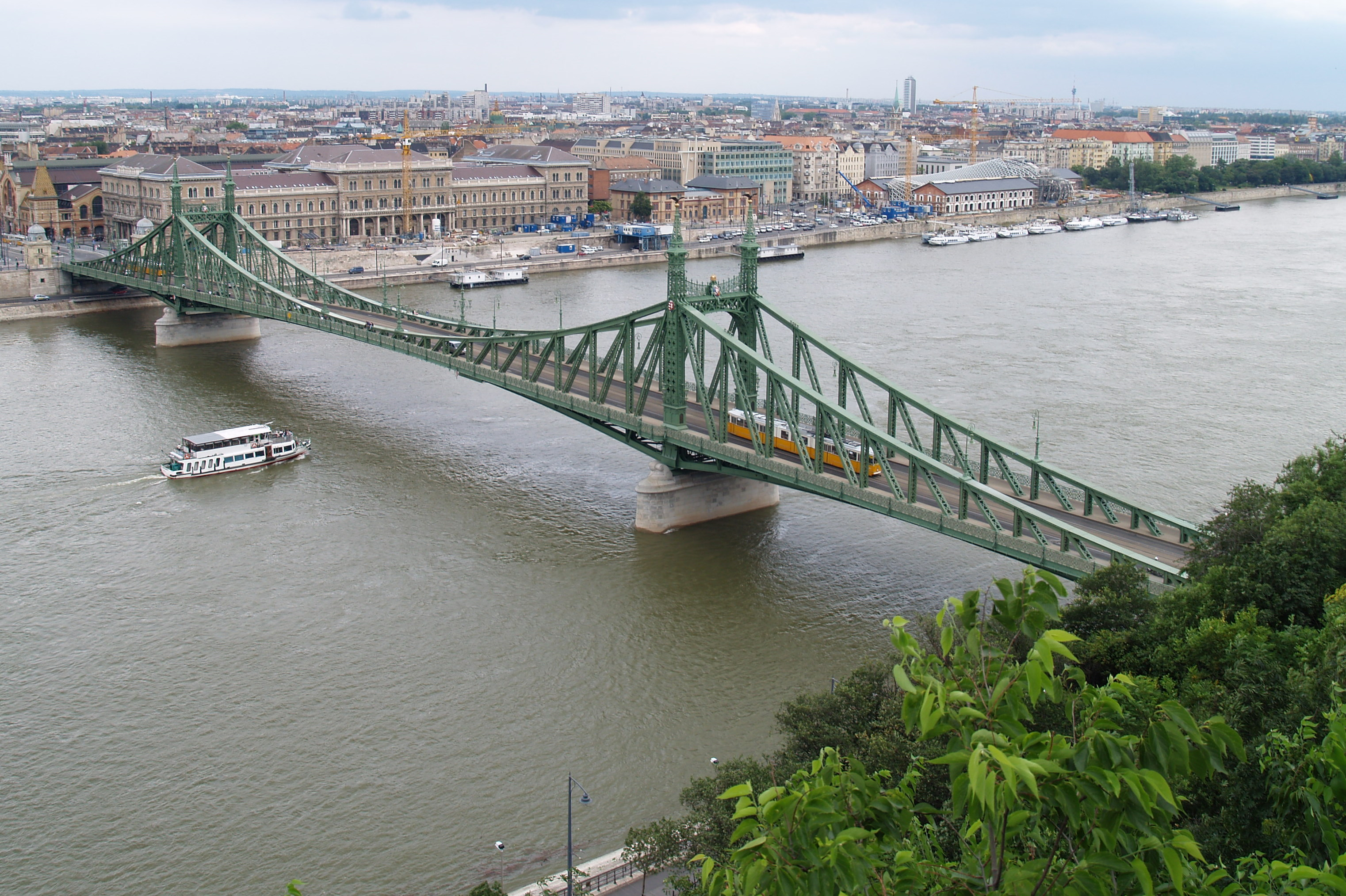 Vabadussild Budapestis.